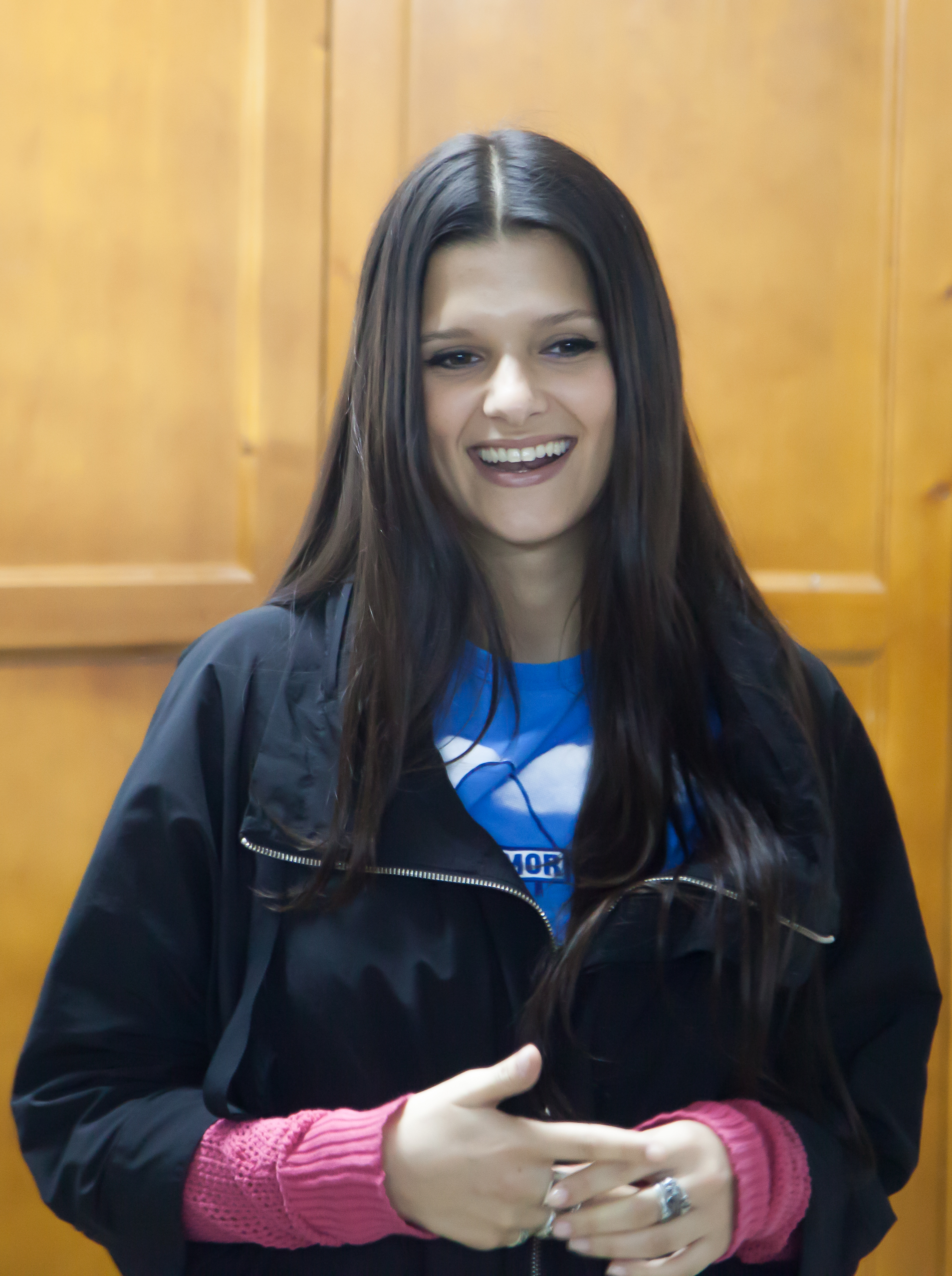 Vilamor (filme). Sabela Arán